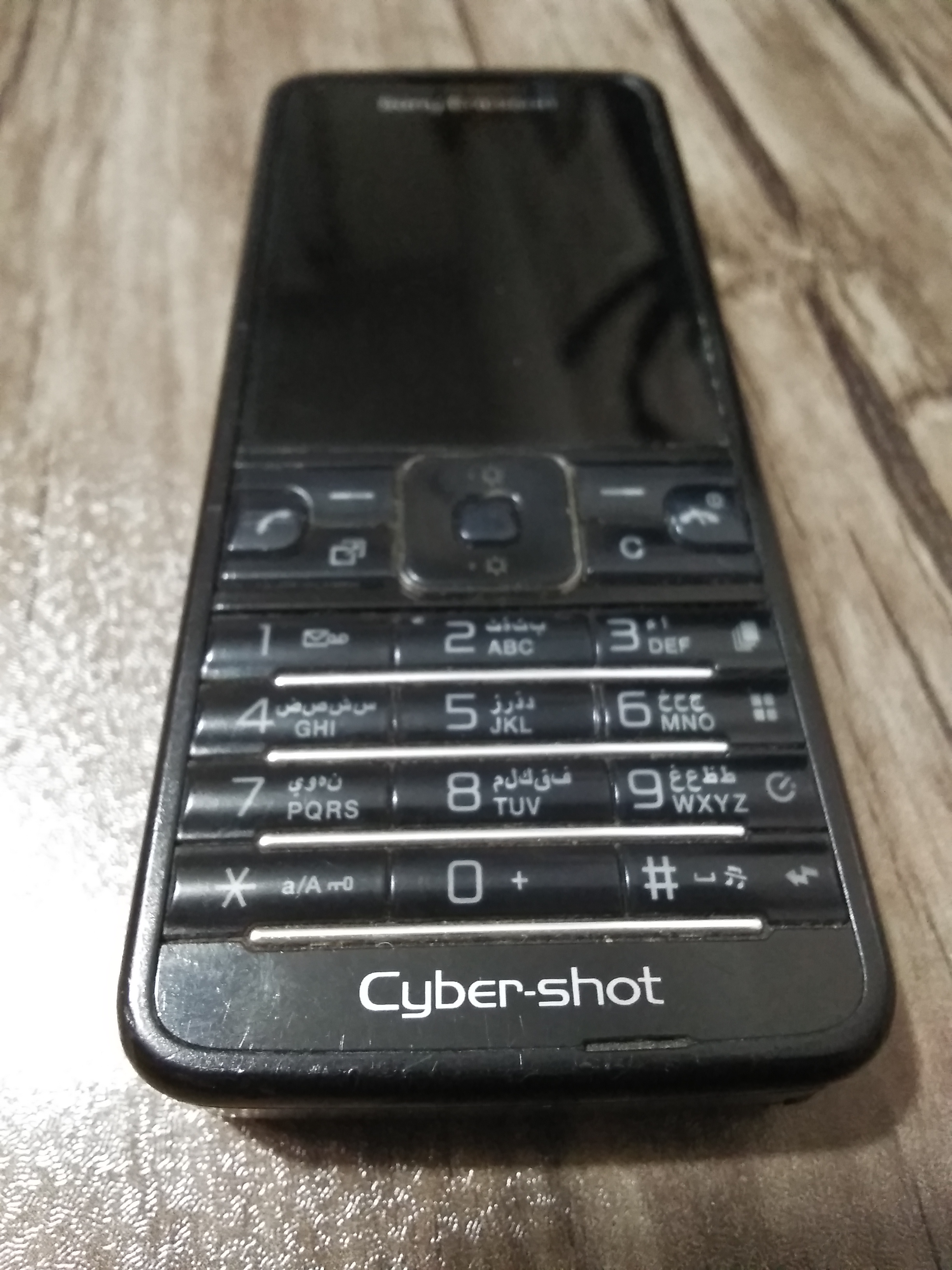 تصویر موبایل سونی اریکسون c901